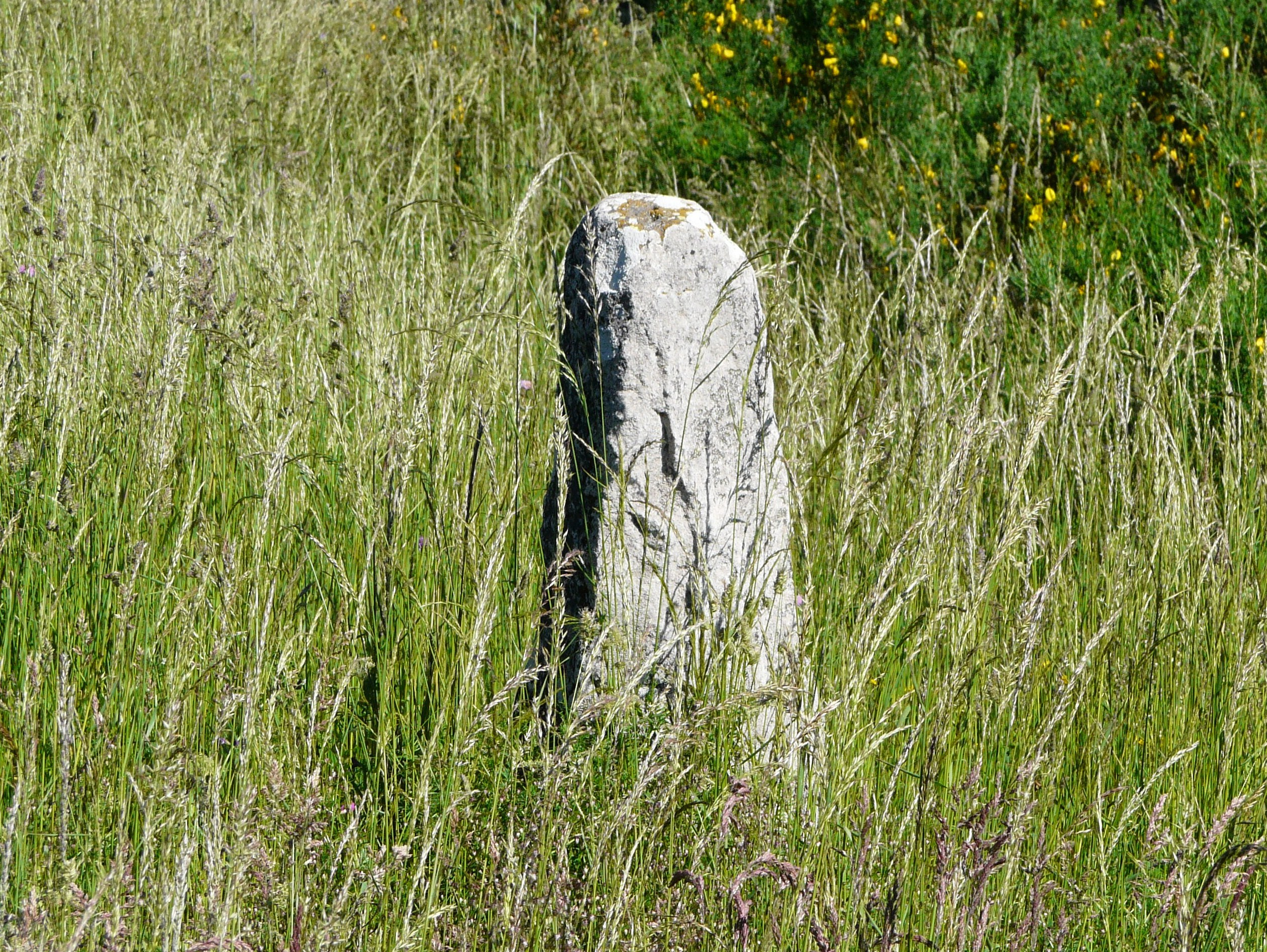 Émergeant des hautes herbes, le menhir de Bargueyrac, ou de la Pierre Plantade, Sériers, Cantal, France.